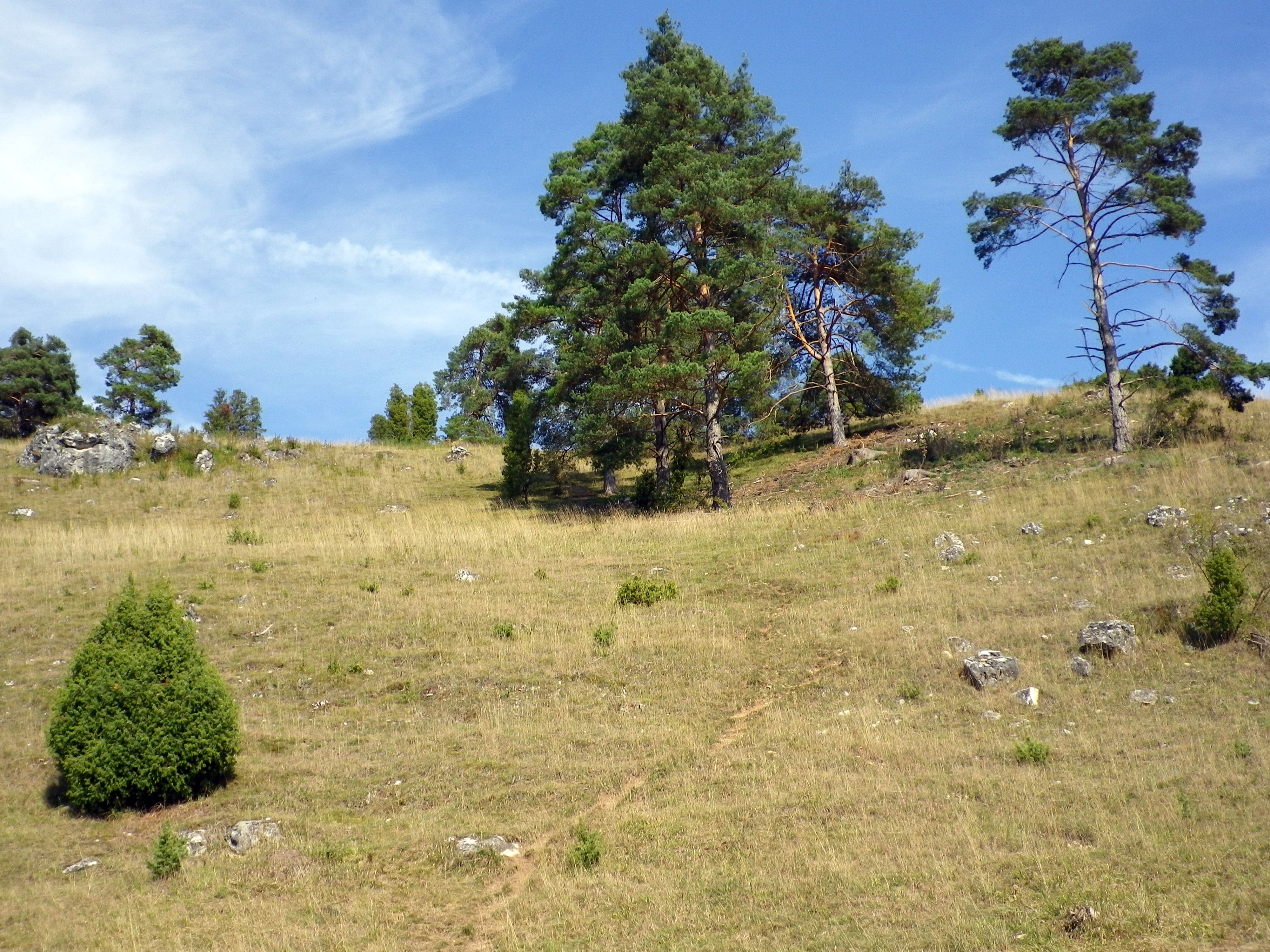 Kirchental von Gungolding